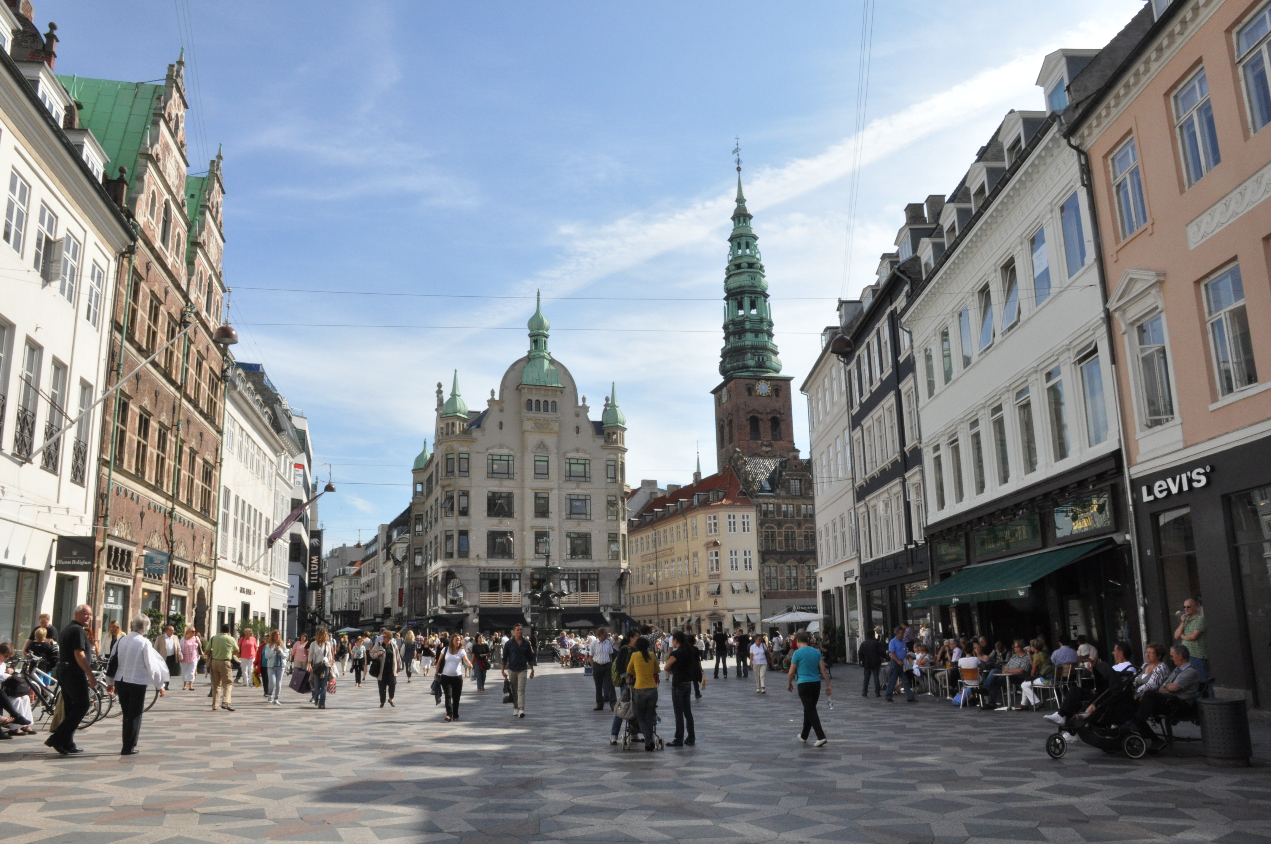 Amagertorv in Copenhagen, Denmark